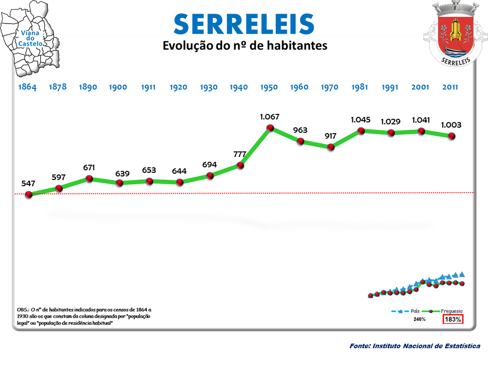 Censos 1864/2011